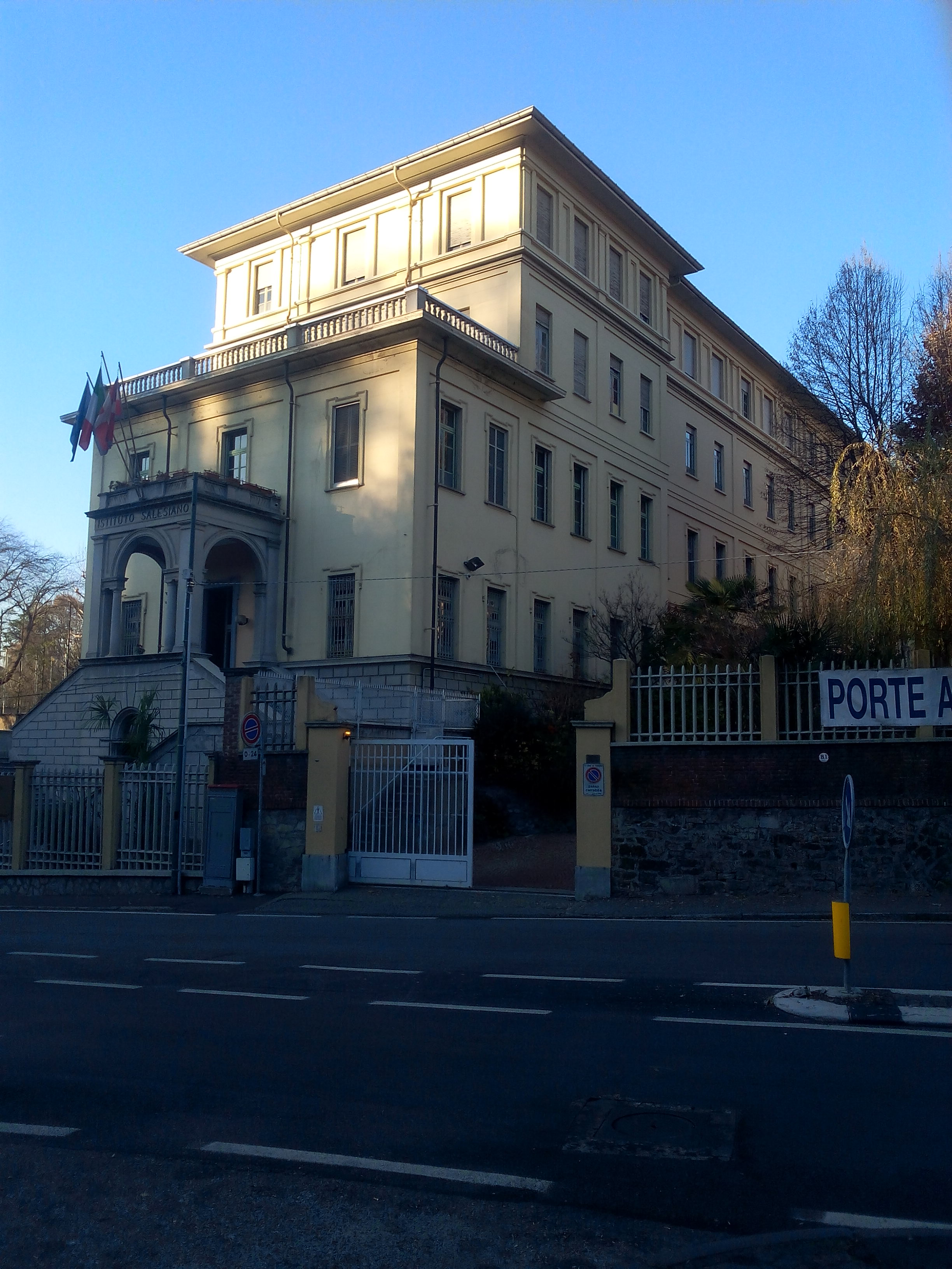 Liceo Salesiano Valsalice (Torino)